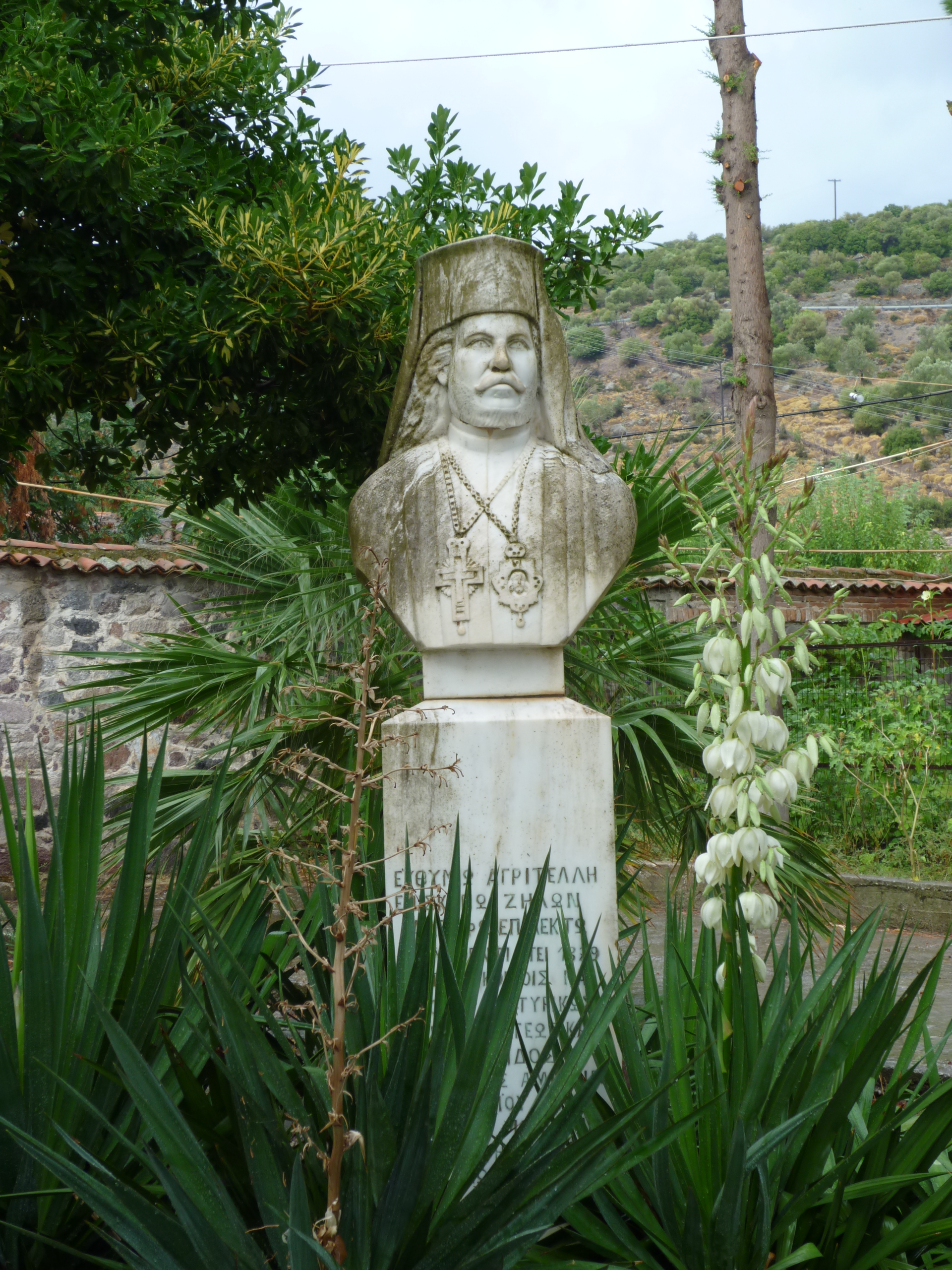 Statue im Gartenbereich des Klosters Moni Limonos auf Lesbos.